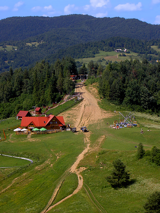 Widok na górną stację kolejki na Palenicę